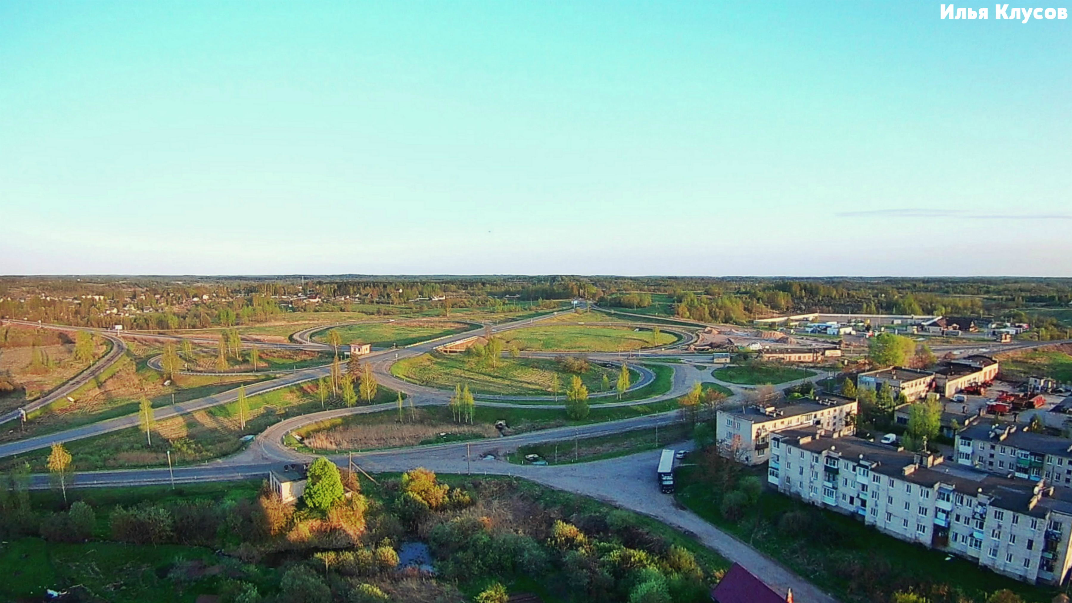 Вид на развилку